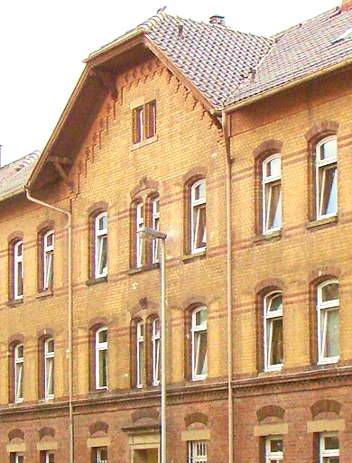 Ausschnitt aus File:Hn-boeck-grossgart23.jpg